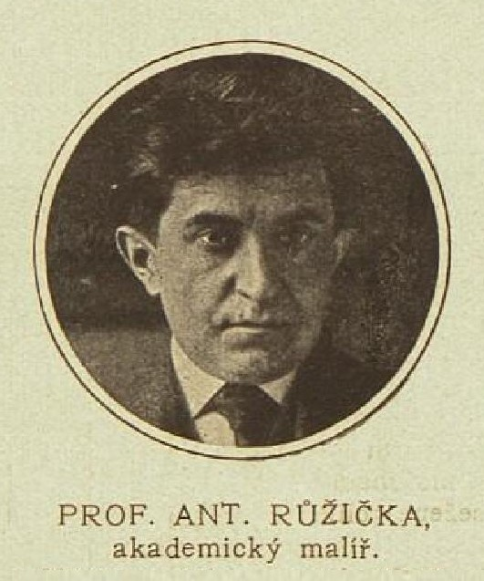 Antonín Růžička (1887-1951), český malíř a profesor kreslení